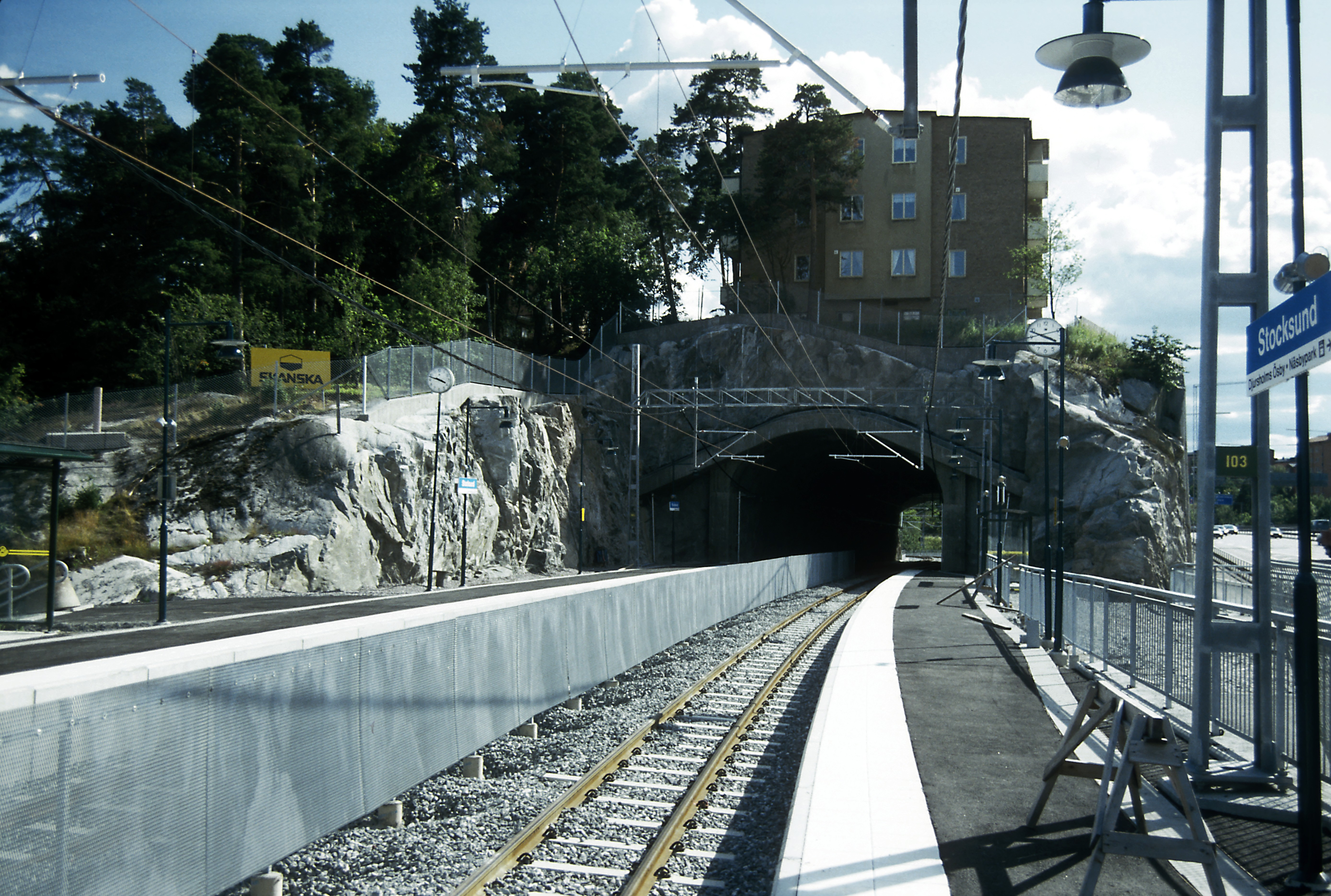 Neutrassiert für durchgehend zweigleisigen Betrieb. Die Bahnsteige liegen jetzt neben der Straße.